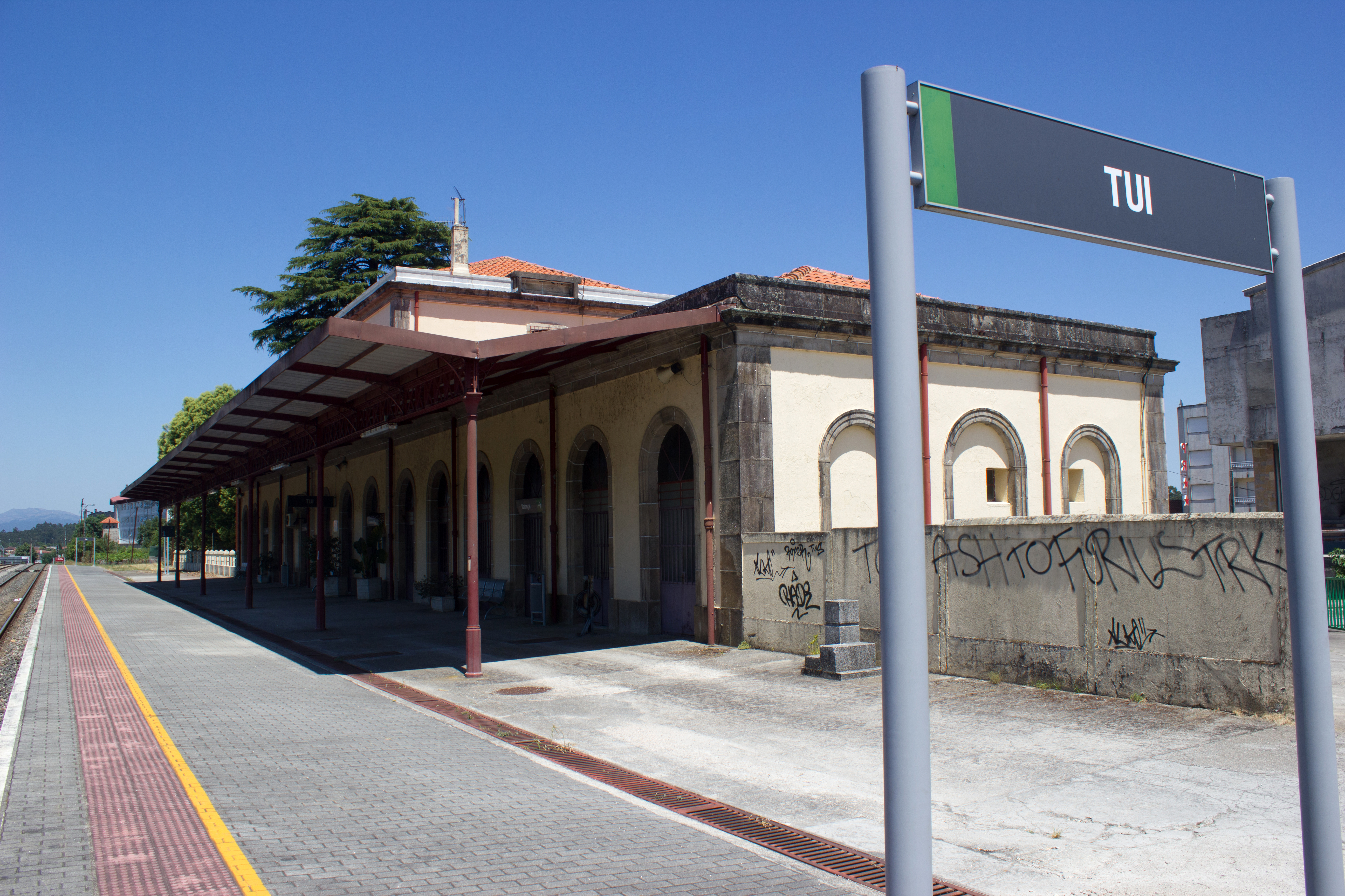 Estación de tren de Tui.